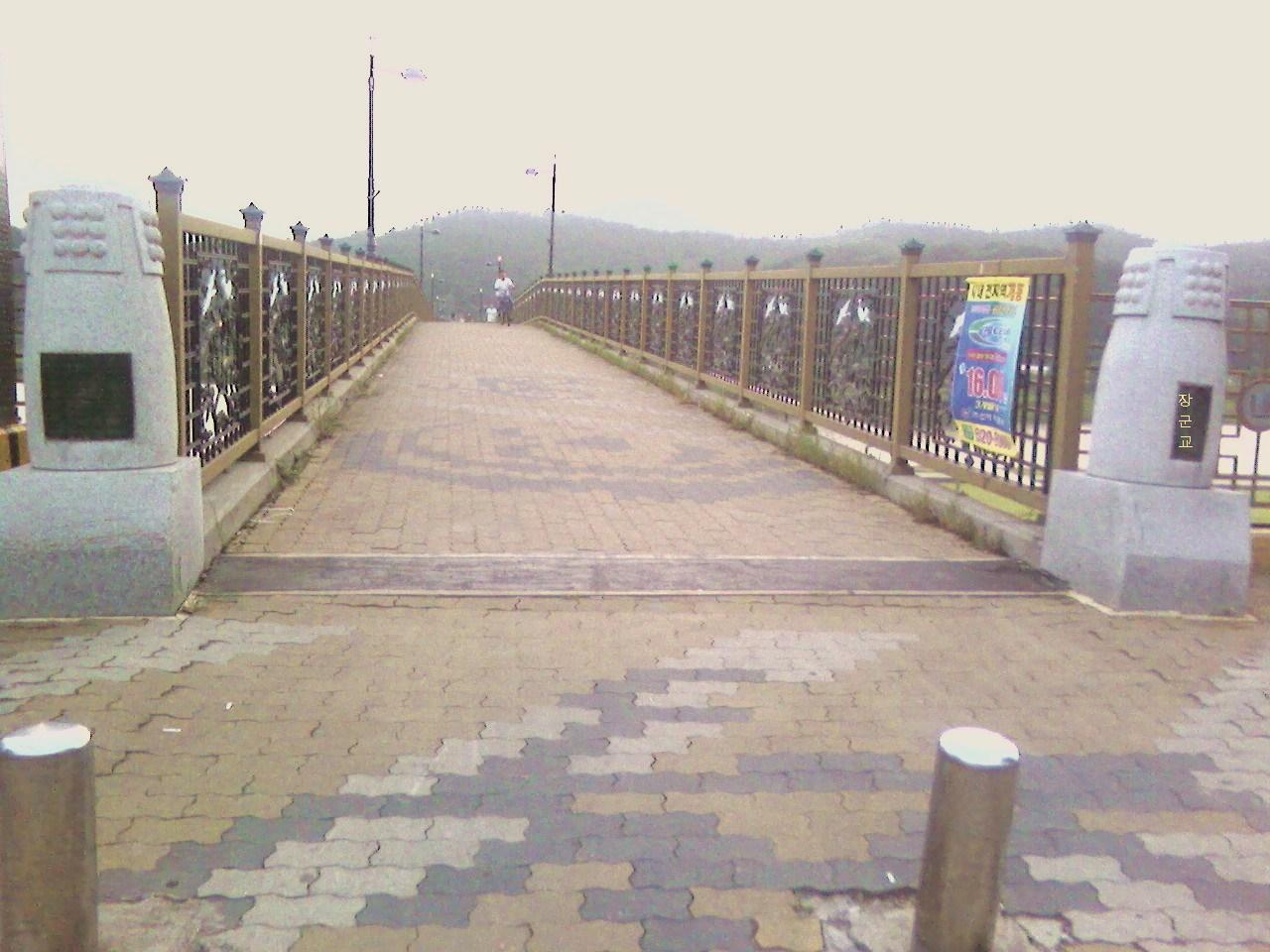 gyeongju, General bridge